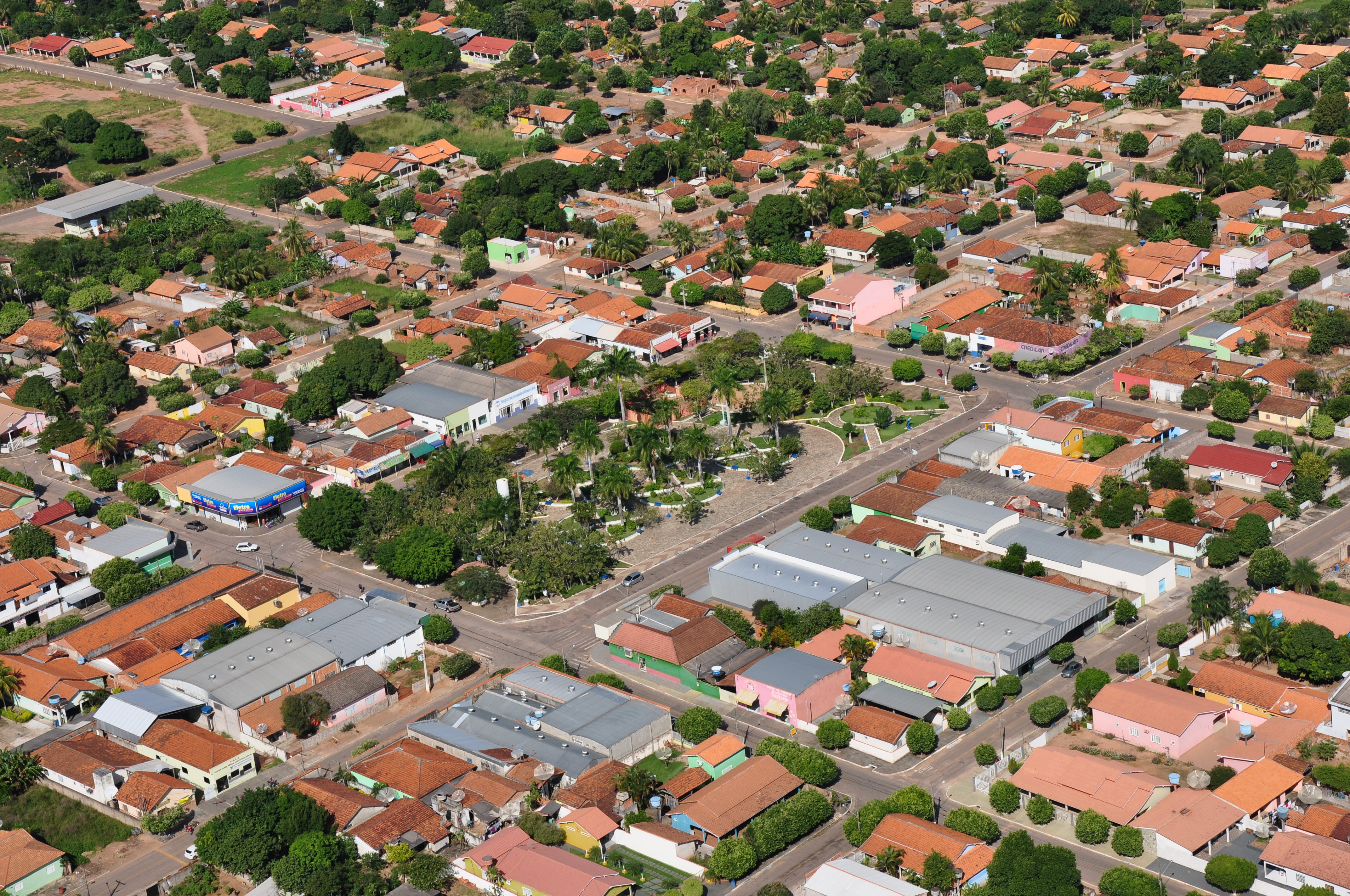 VISTA AEREA DO CENTRO DE FIGUEIROPOLIS DOESTE